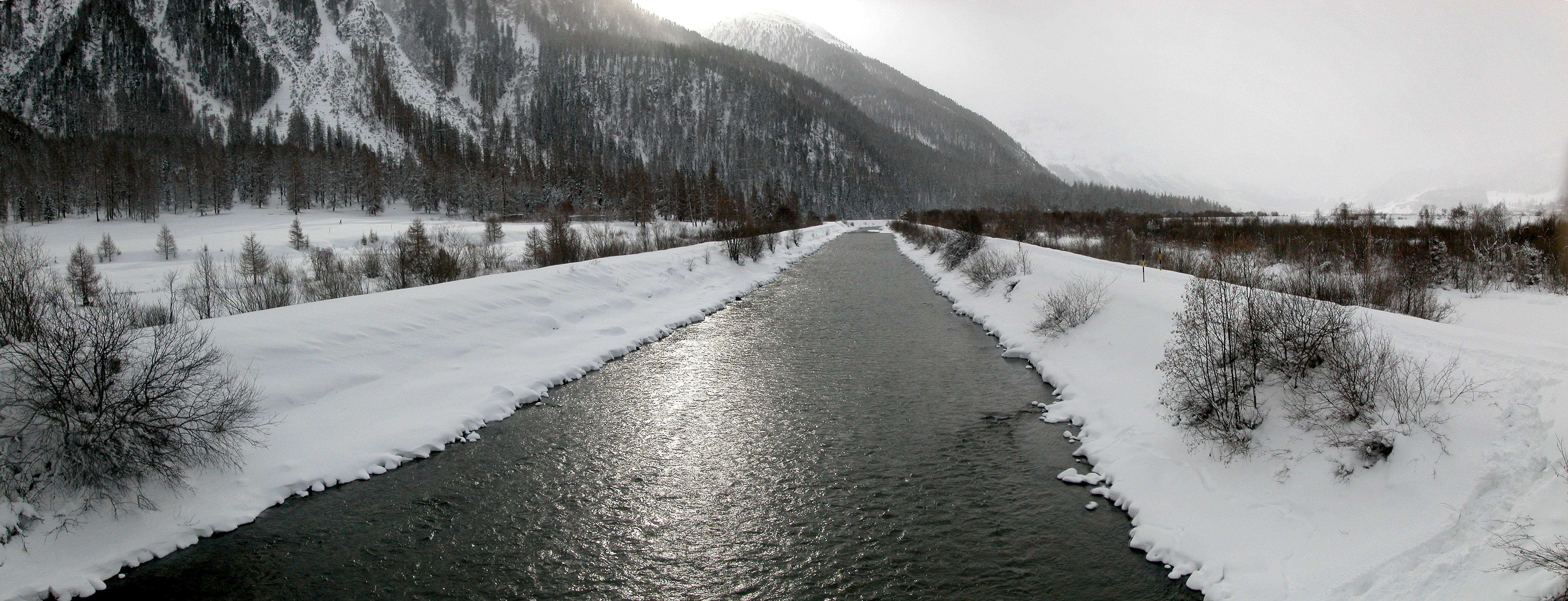 Inn bei Bever